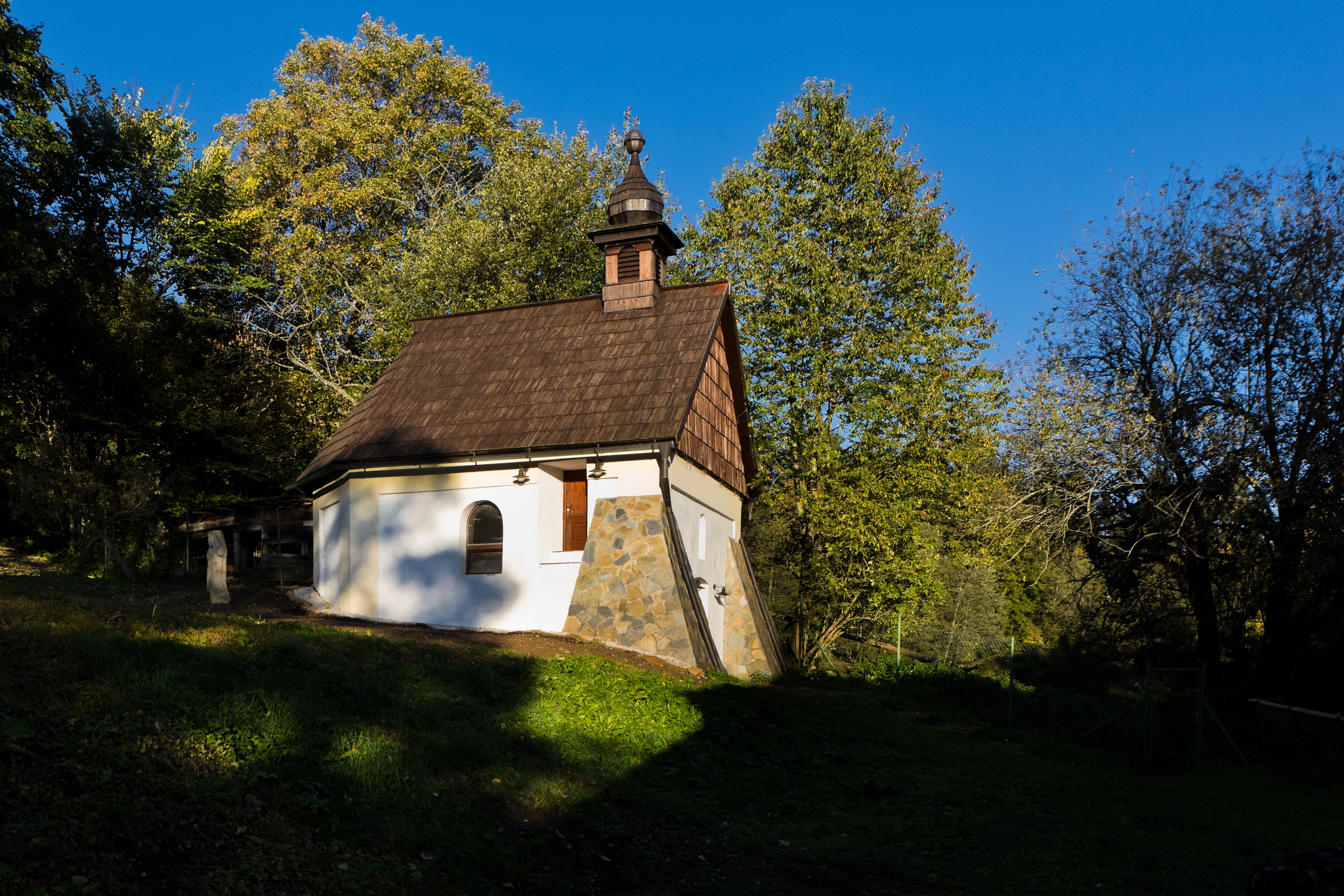 Pohled na kapli sv. Barbory z areálu Rezidence Vogelsang